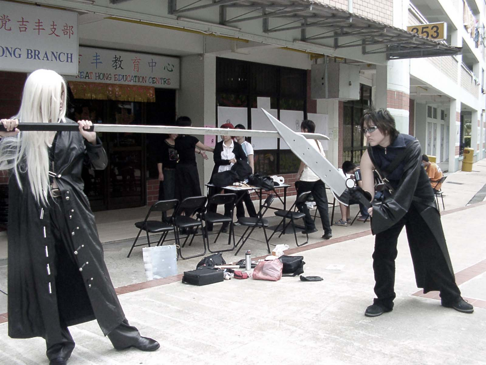 „...Ich lösch Dich aus!“.